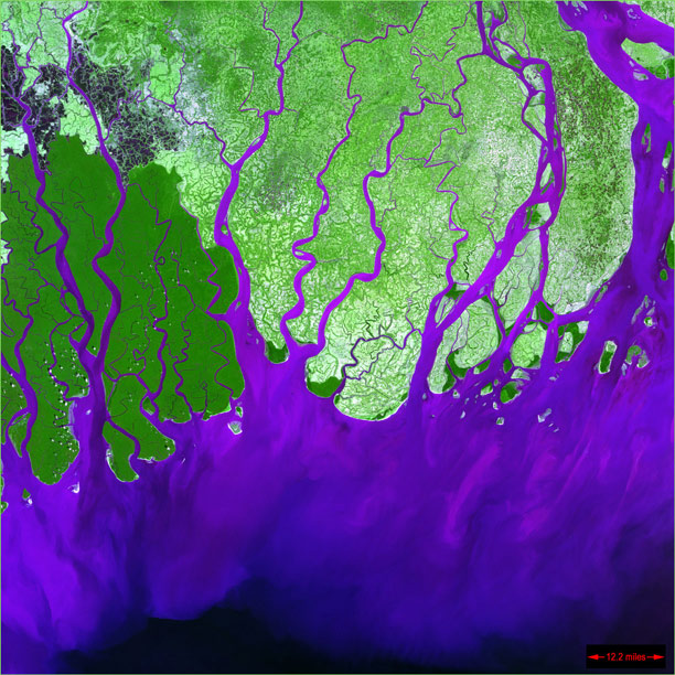 L'embouchure du Gange Image courtesy of NASA Landsat Project Science Office and USGS EROS Data Center